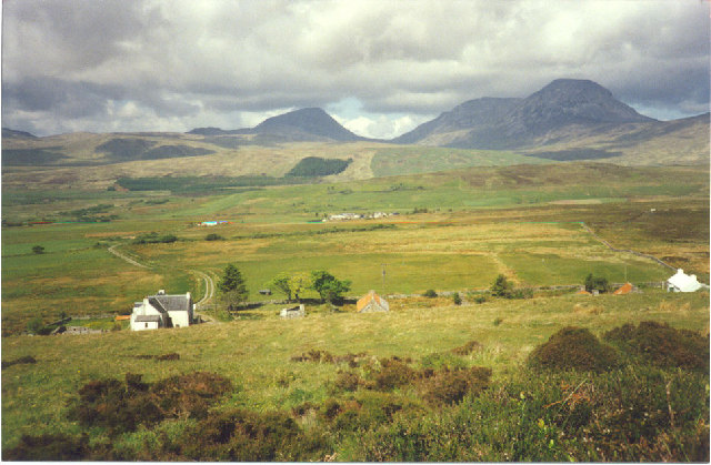 Ardfernal